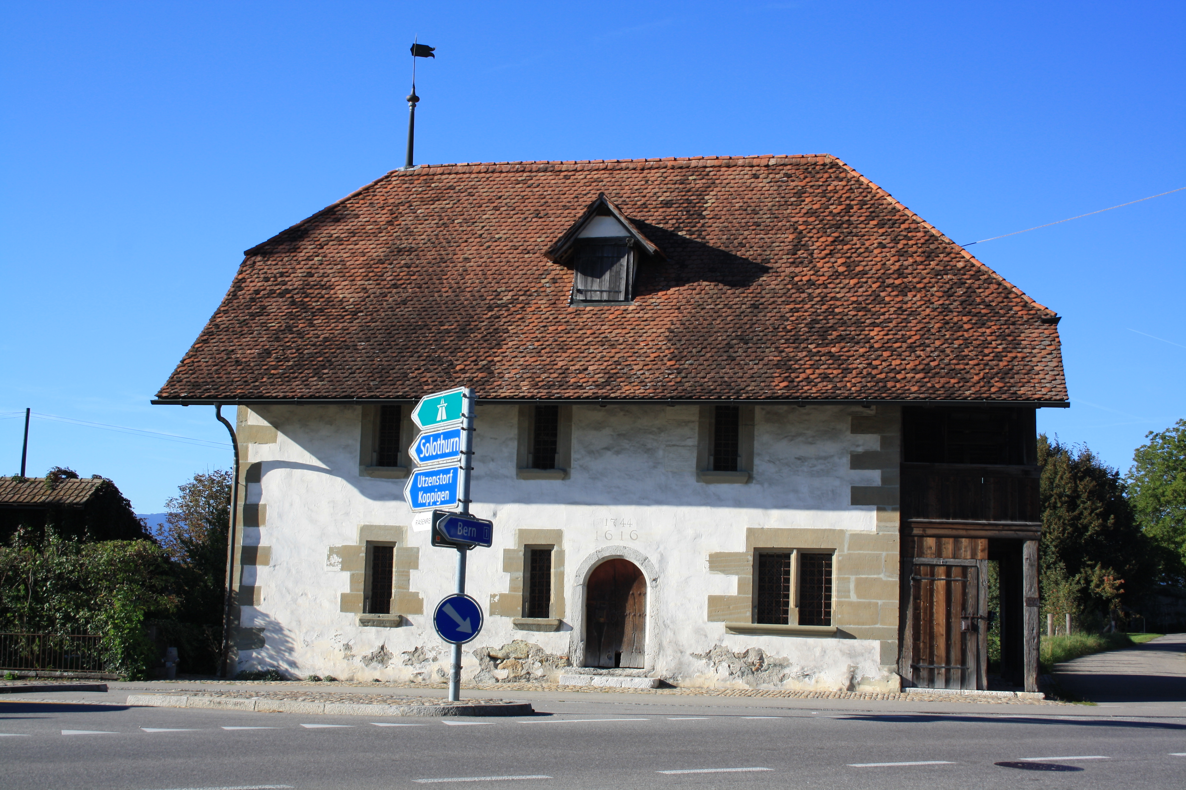 St. Niklaus, Gmeinde Koppigen, Kanton Bern, Schweiz